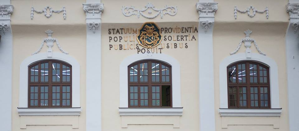 Erb Malohontu na priečelí bývalého župného domu